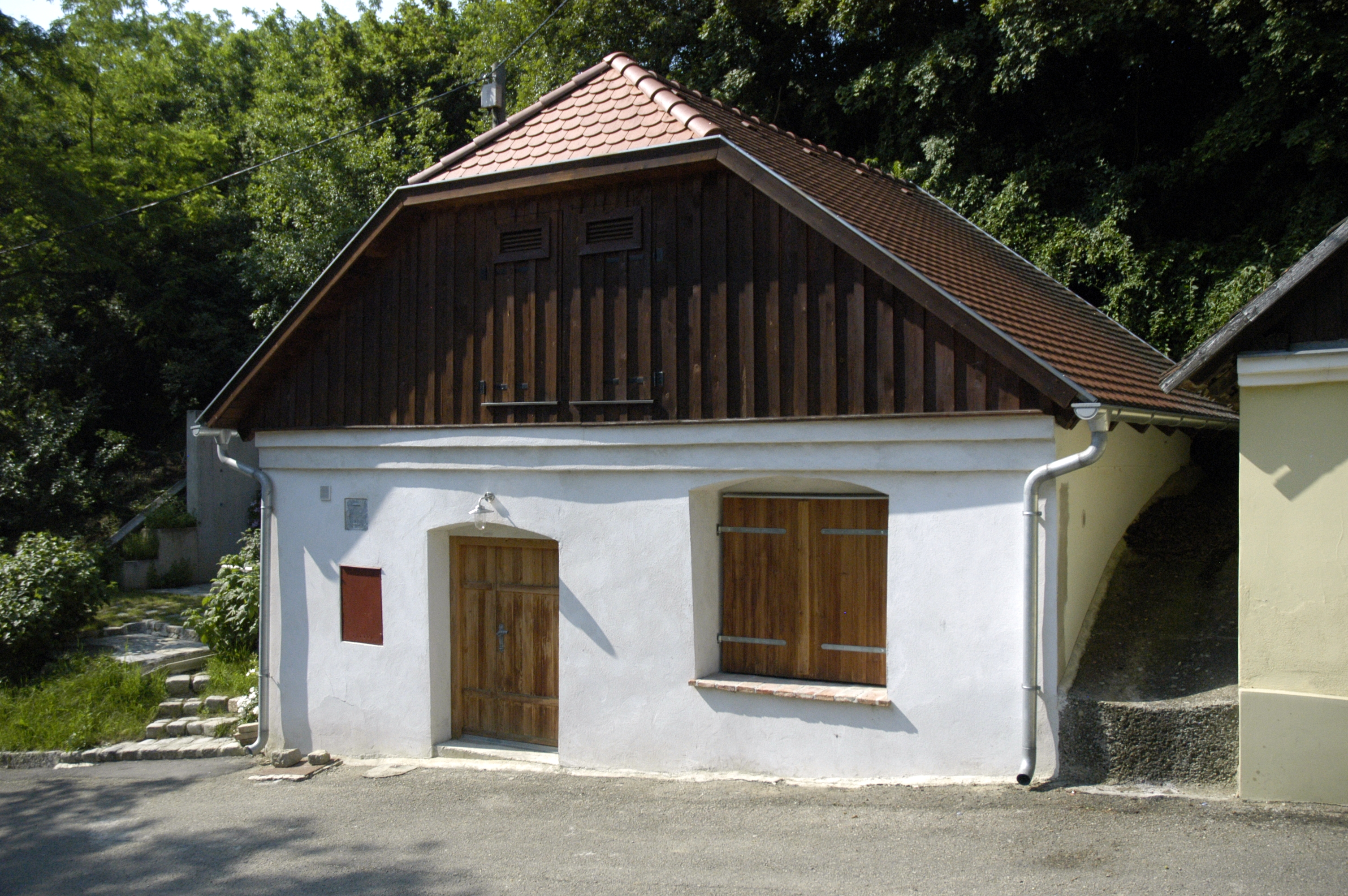 Keller Breitfuß in der Mühlbergkellergasse in Sitzendorf an der Schmida